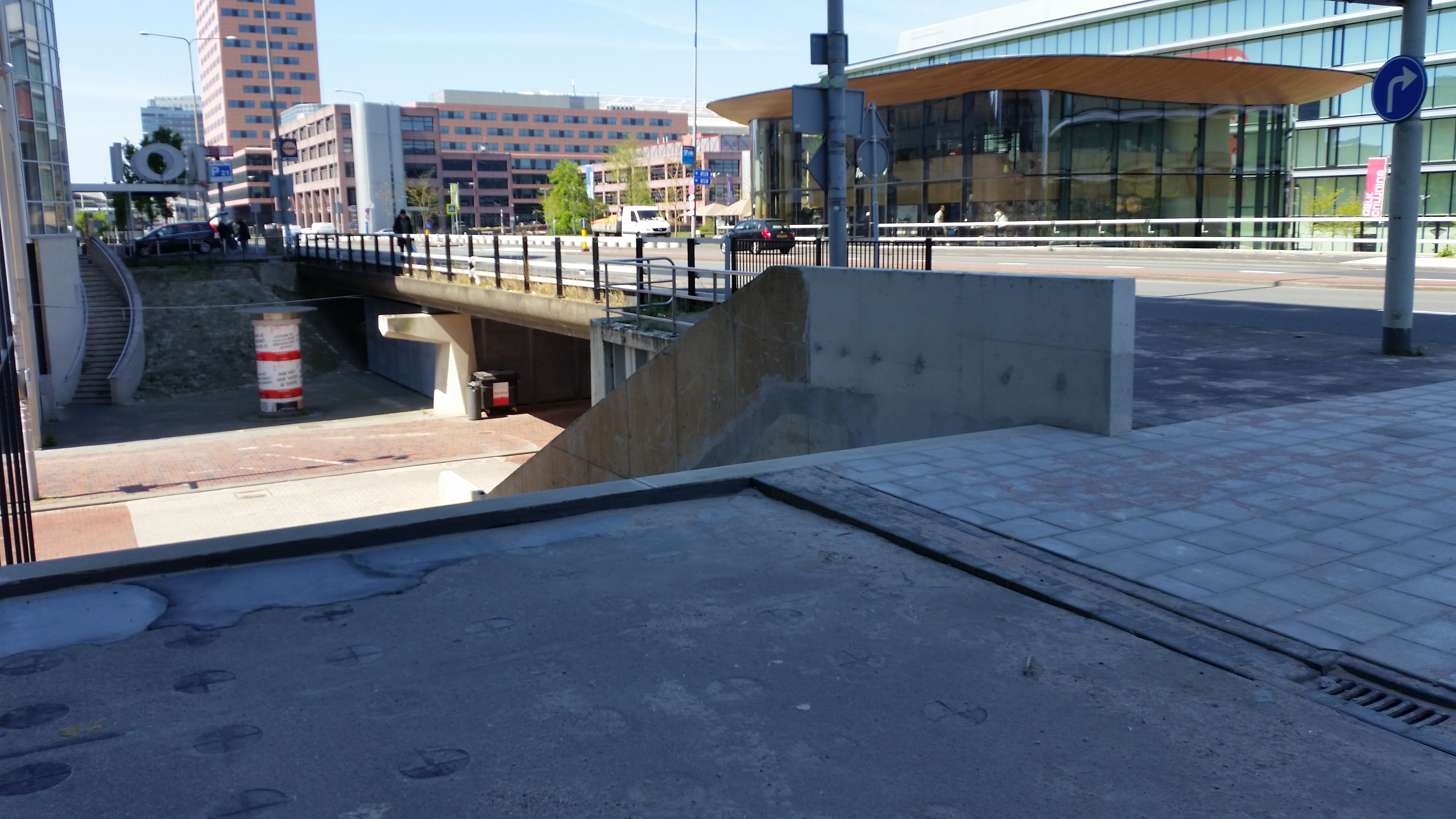 Impressie van Brug 1010 in de Bijlmerdreef over het Abcouderpad, Amsterdam-Zuidoost. Aan de brug is middels kleine brugjes een restaurant gekoppeld.